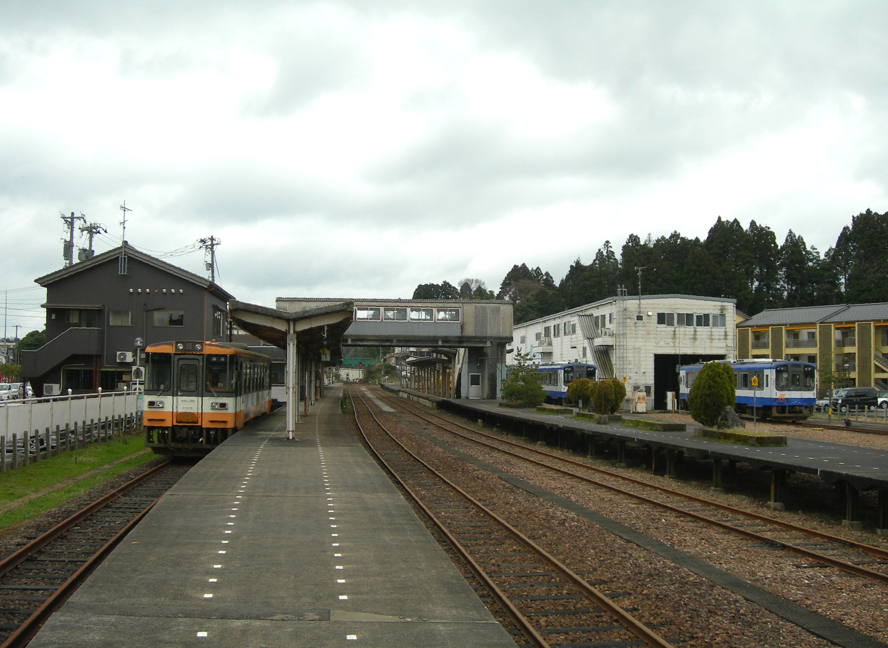 穴水駅ホーム